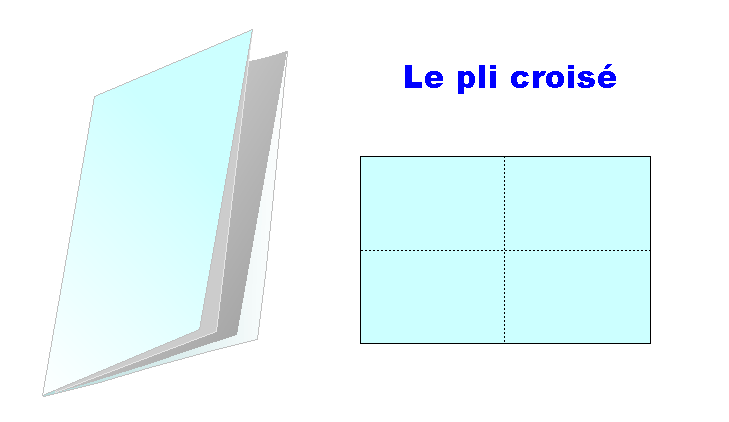 image perso libre de droit